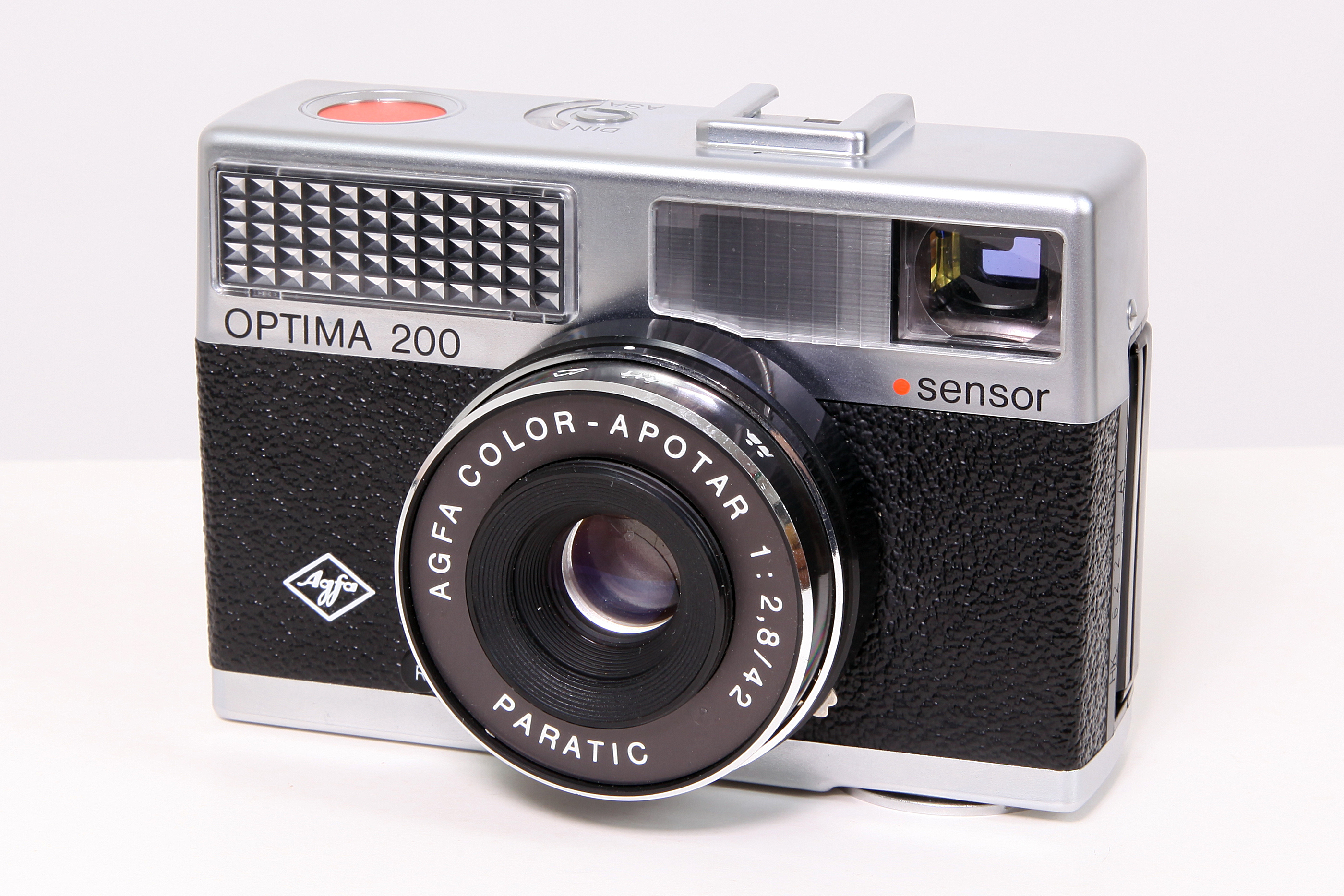 Fotoapparat Agfa Optima 200